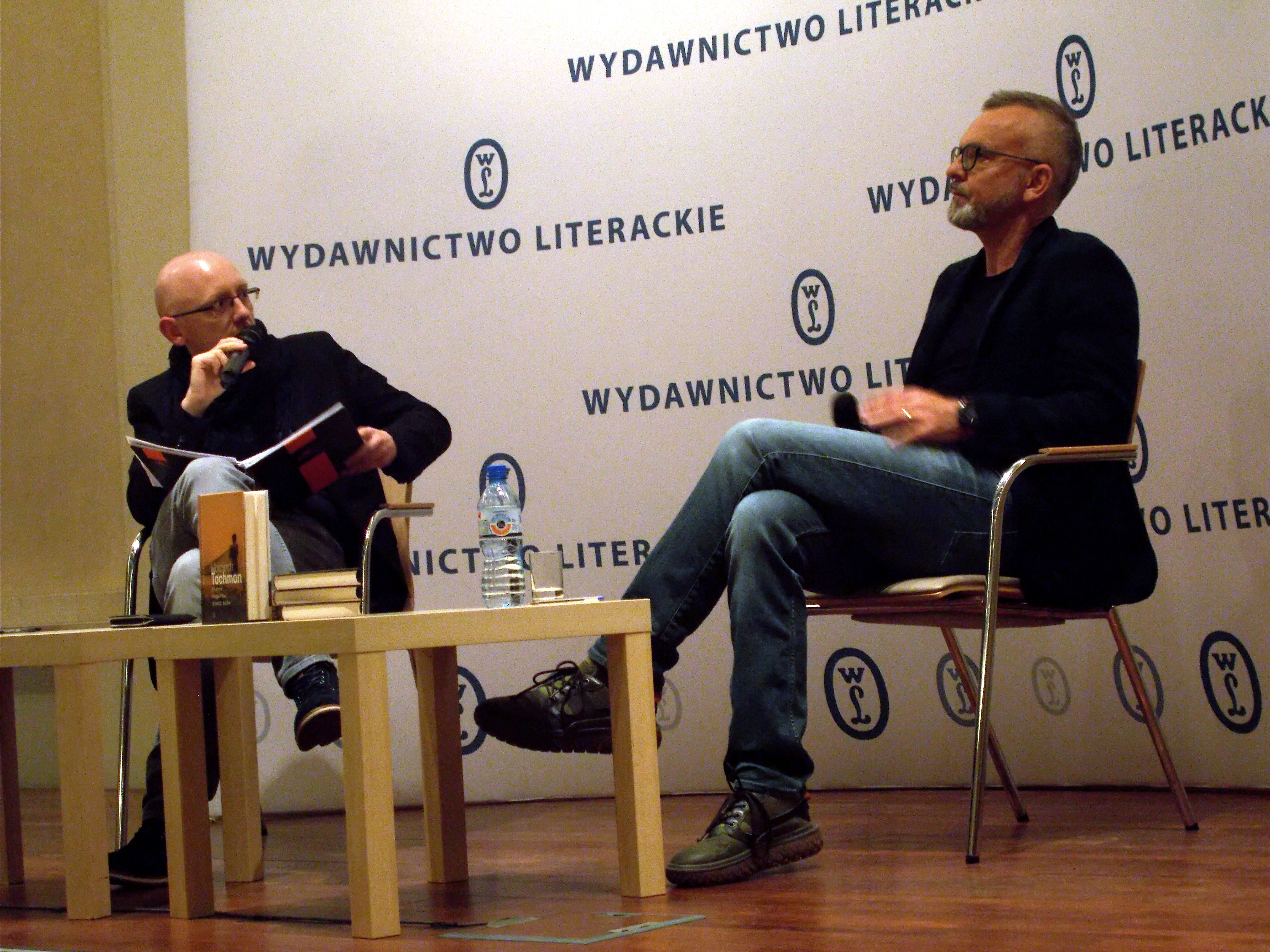 Spotkanie Wojciecha Tochmana z czytelnikami w Krakowie, w Międzynarodowym Centrum Kultury, po wydaniu książki „Pianie kogutów, płacz psów”